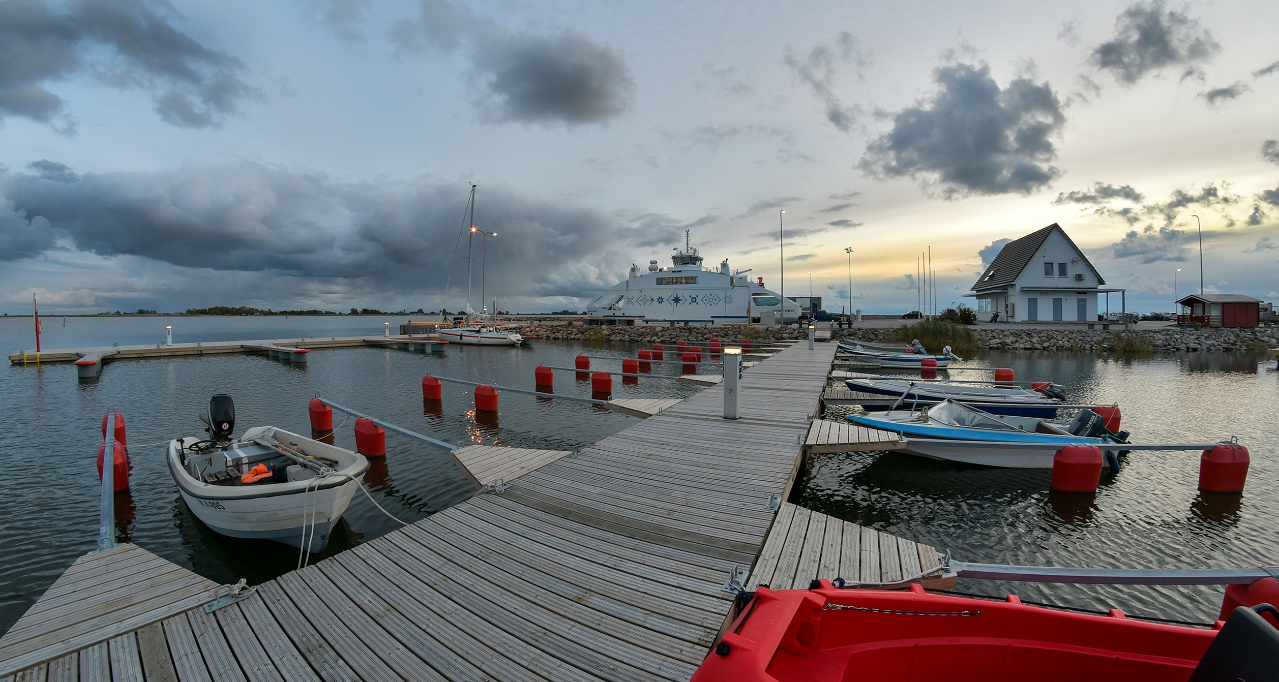 Taamal Kihnu praam "Kihnu Virve"